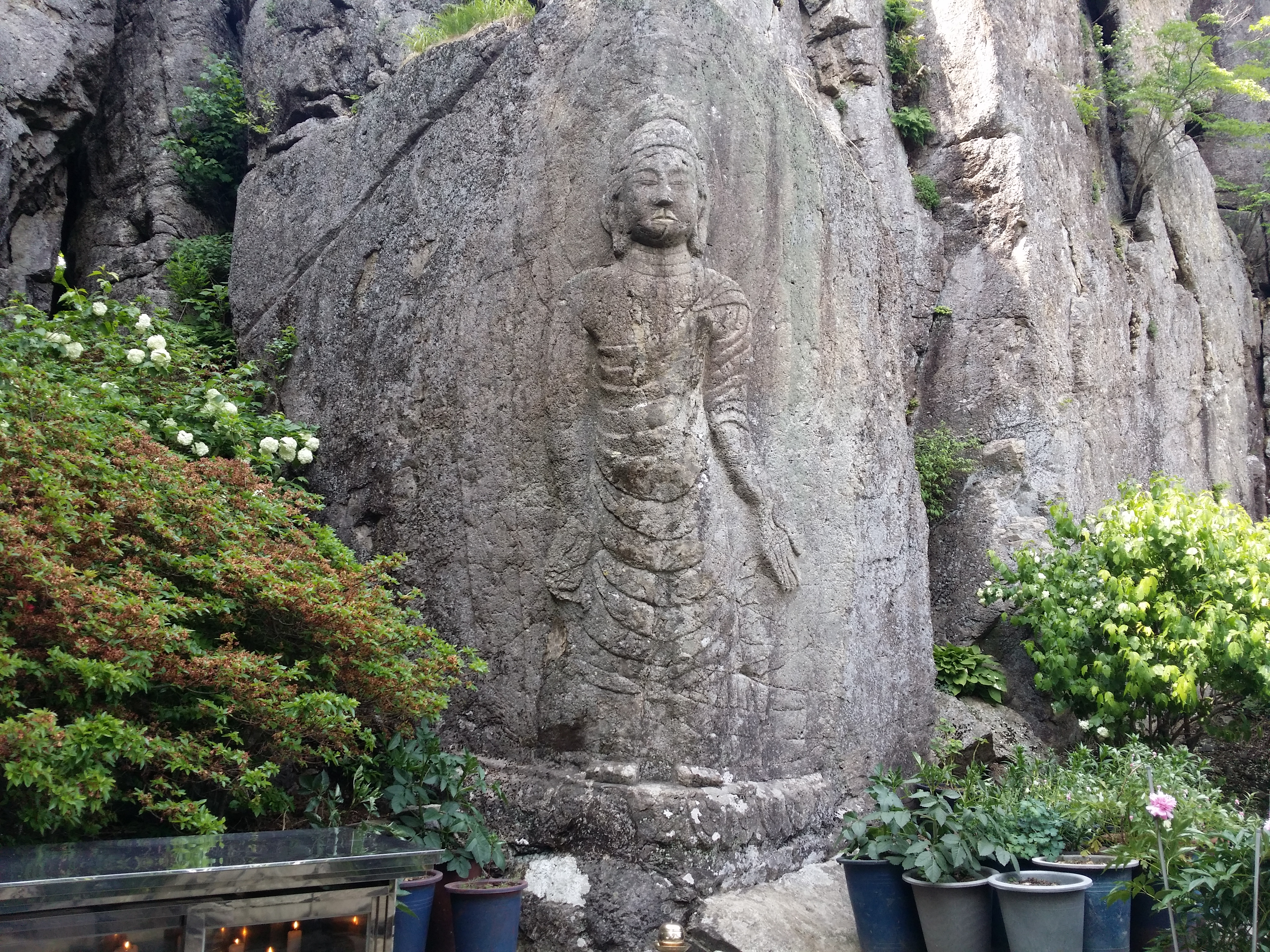 금오산 마애여래입상